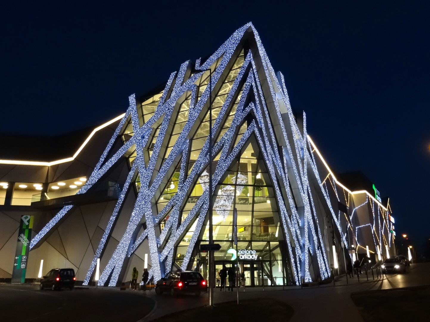 Centrum Handlowe Zielone Arkady w Bydgoszczy